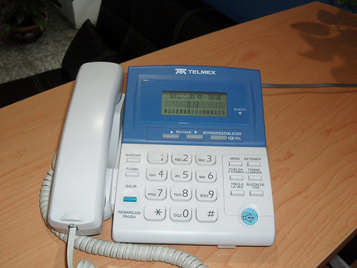 TELEFONO DE LA COMPAÑIA TELMEX